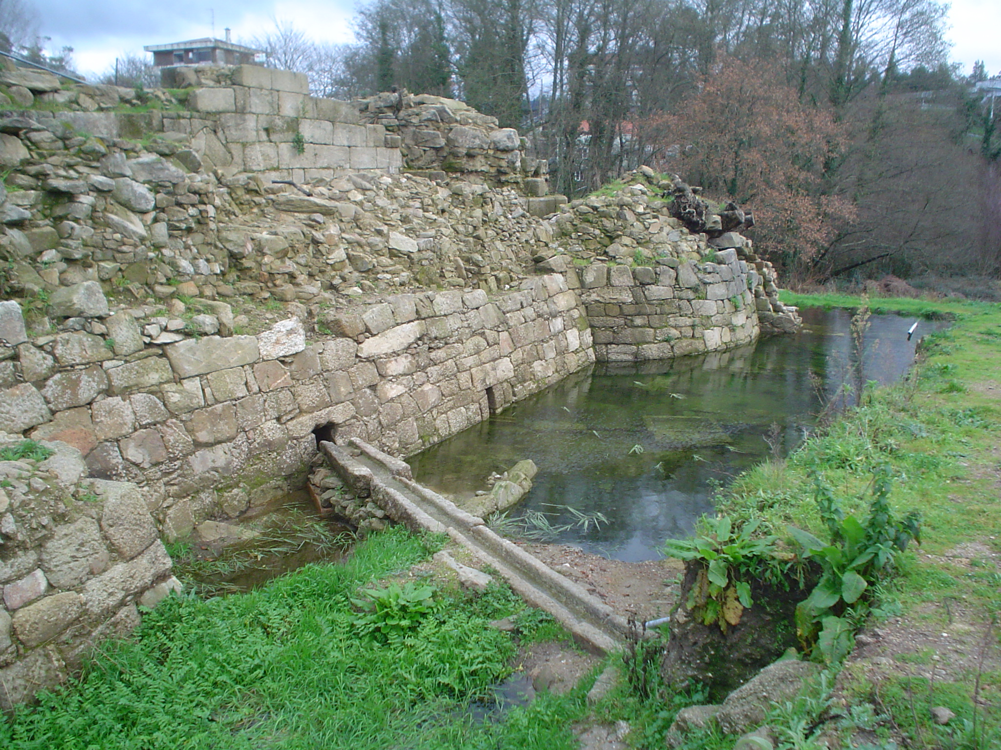 Castelo da Rocha forte. Conxo - Santiago. Detalle das canalizacións